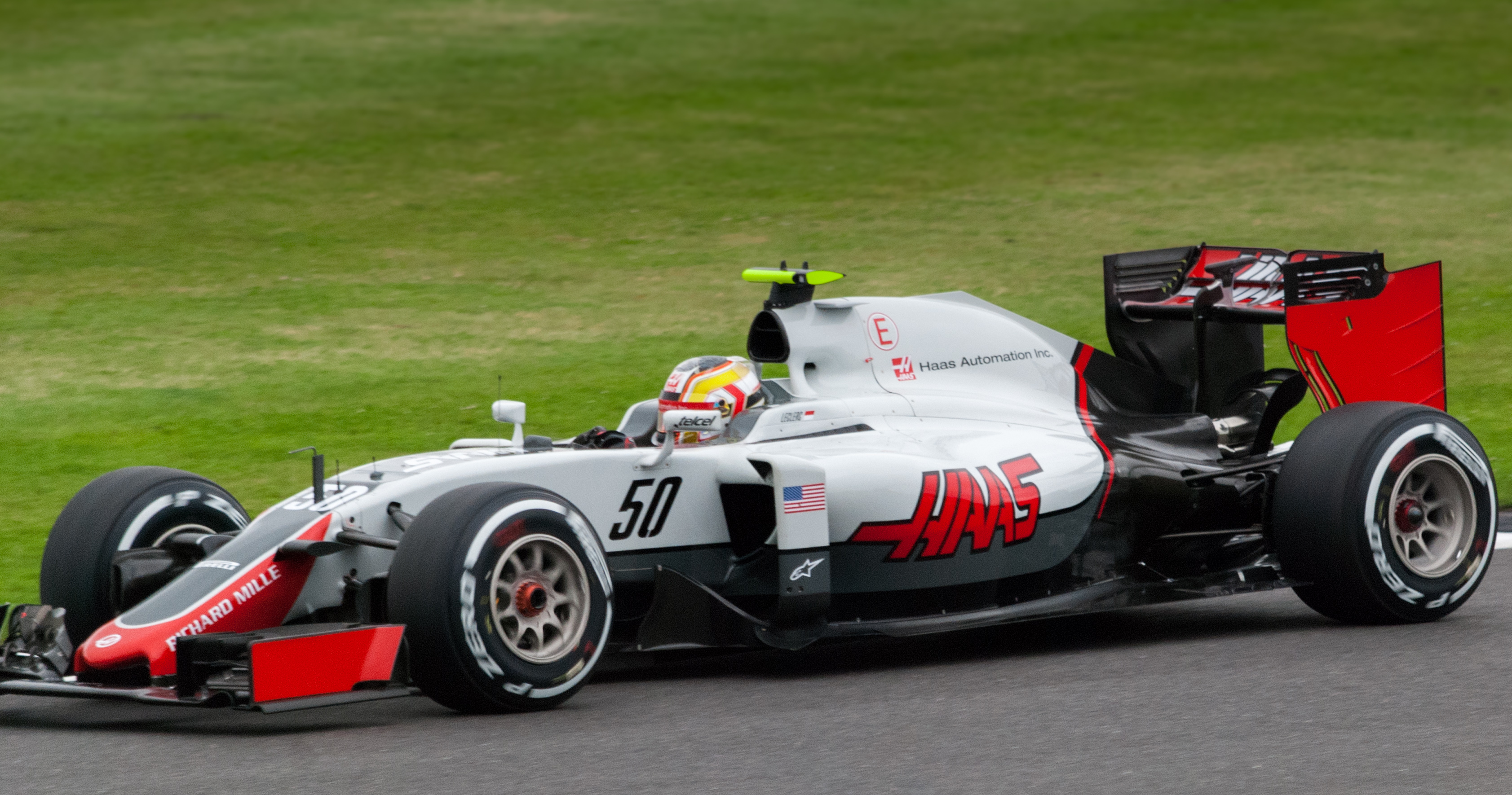 Charles Leclerc - Haas